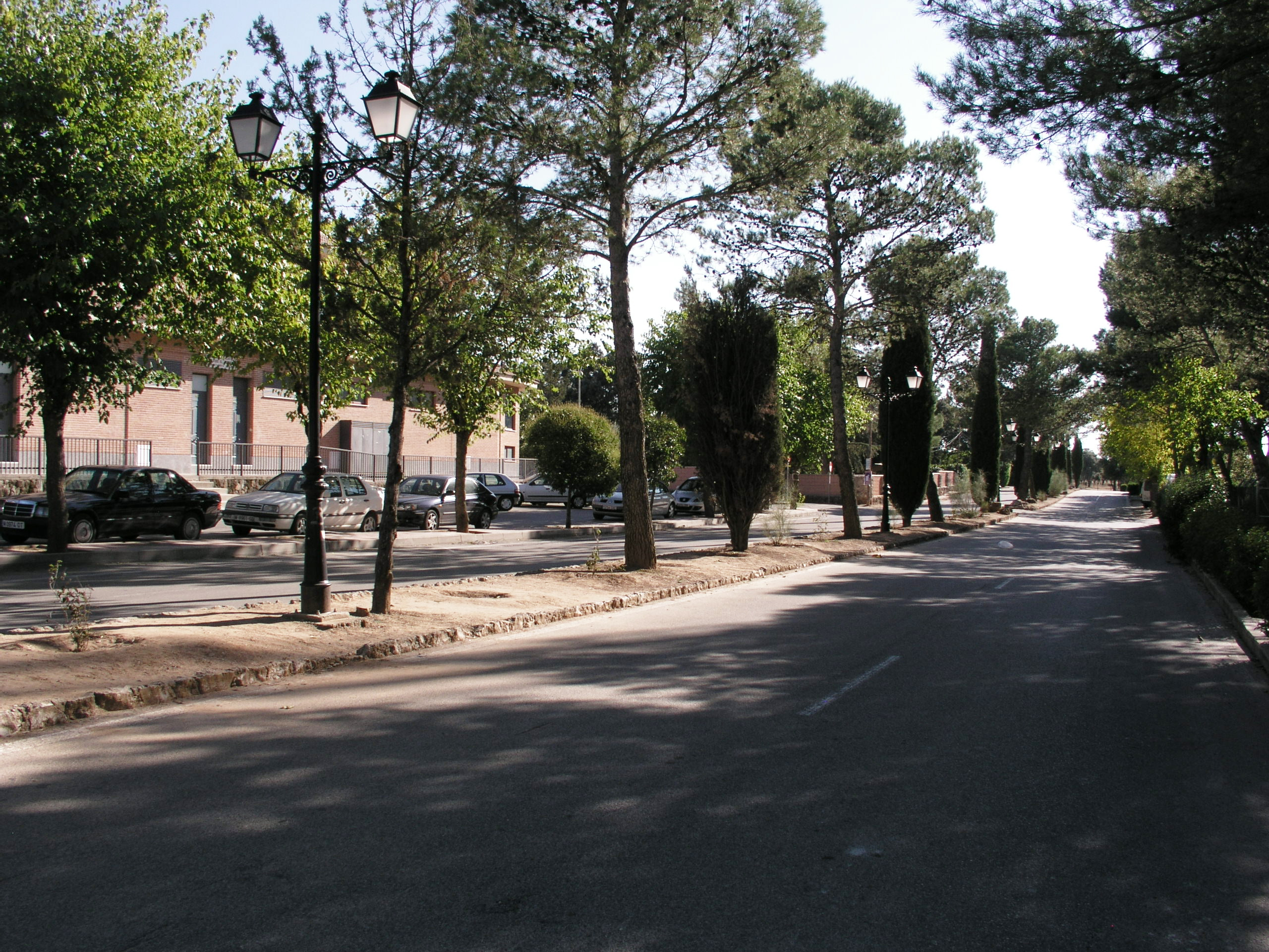 Calle Comunidad Europea, Eurovillas, Nuevo Baztán, Spain.